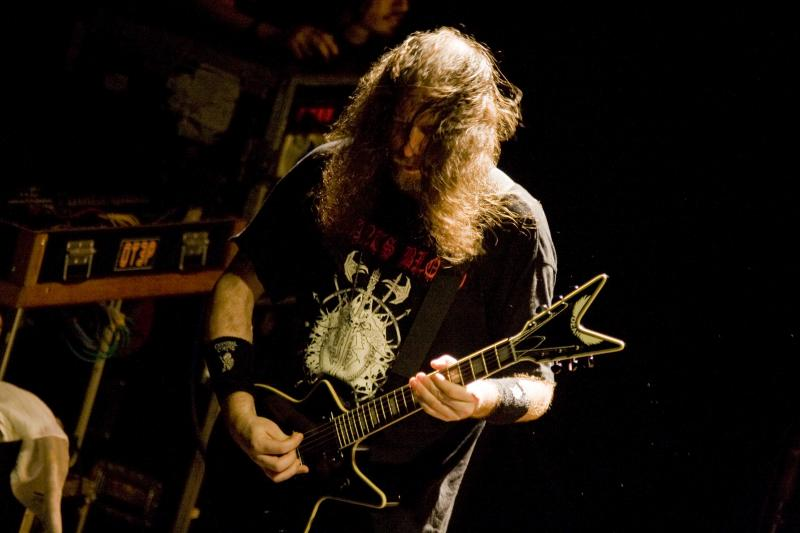 Cannibal Corpse Live @ Santana Hall - 21/02/2010 - São Paulo, Brasil Por favor, não publique nada daqui sem o devido crédito. Fotógrafo: Alexandre Cardoso